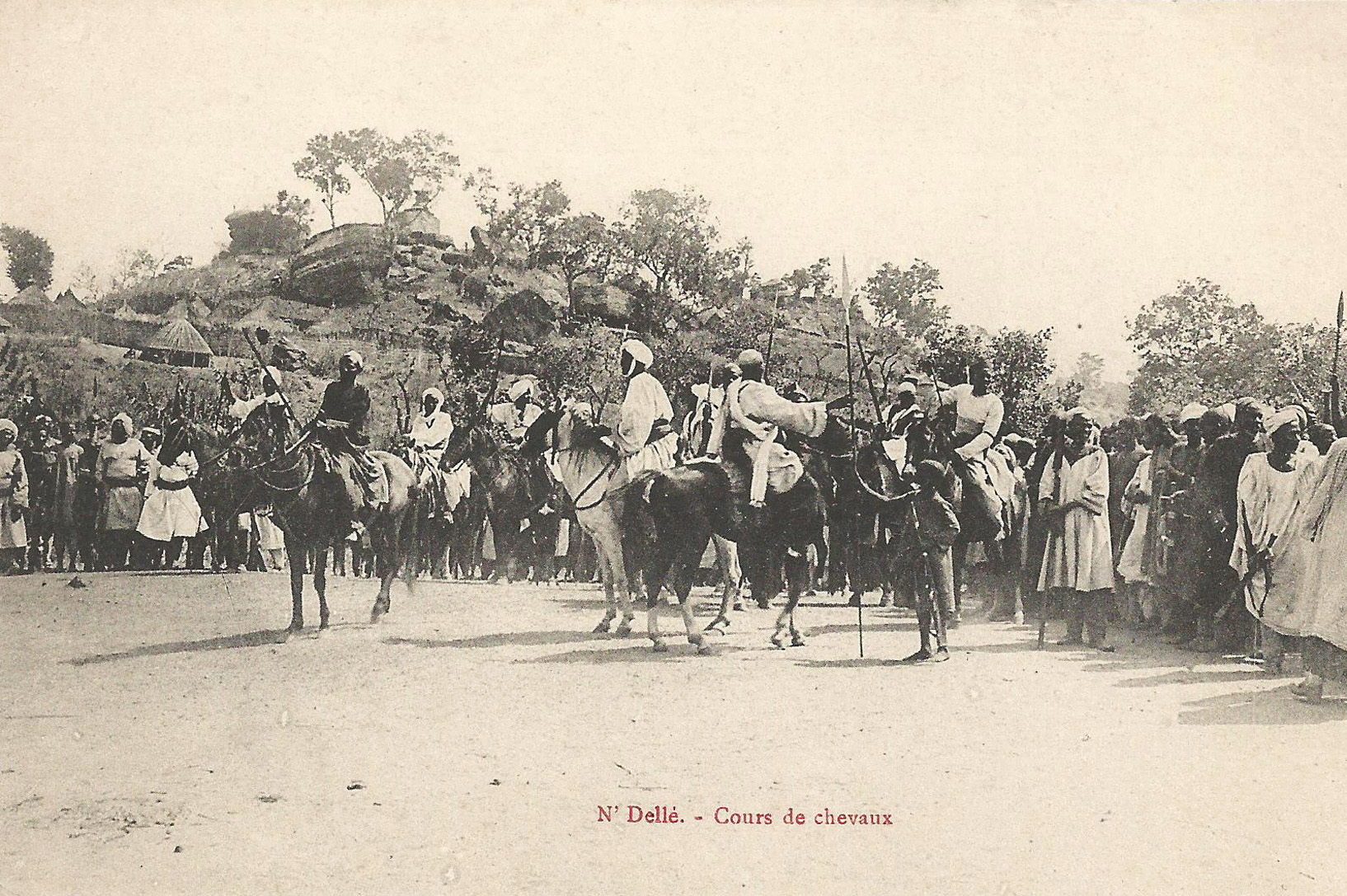 N'Dellé. Cours[e] de chevaux. Carte postale ancienne, sans indication d'auteur, d'éditeur ou de date. Collection particulière